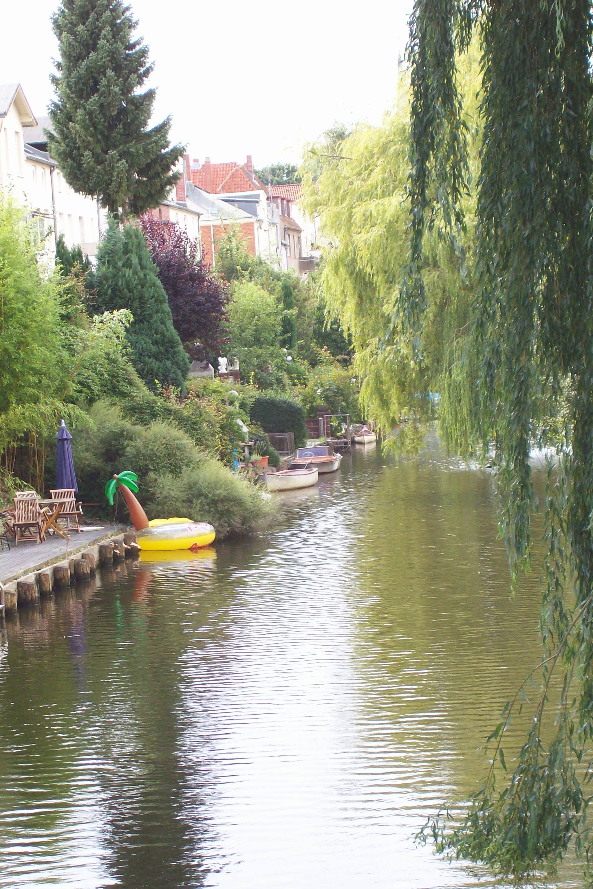 Der Düker entwässert die Wakenitz in Lübeck an der Straße Wakenitzufer in Richtung Mühlenteich/Düker at Wakenitz drains the river to Mühlenteich in Lübeck